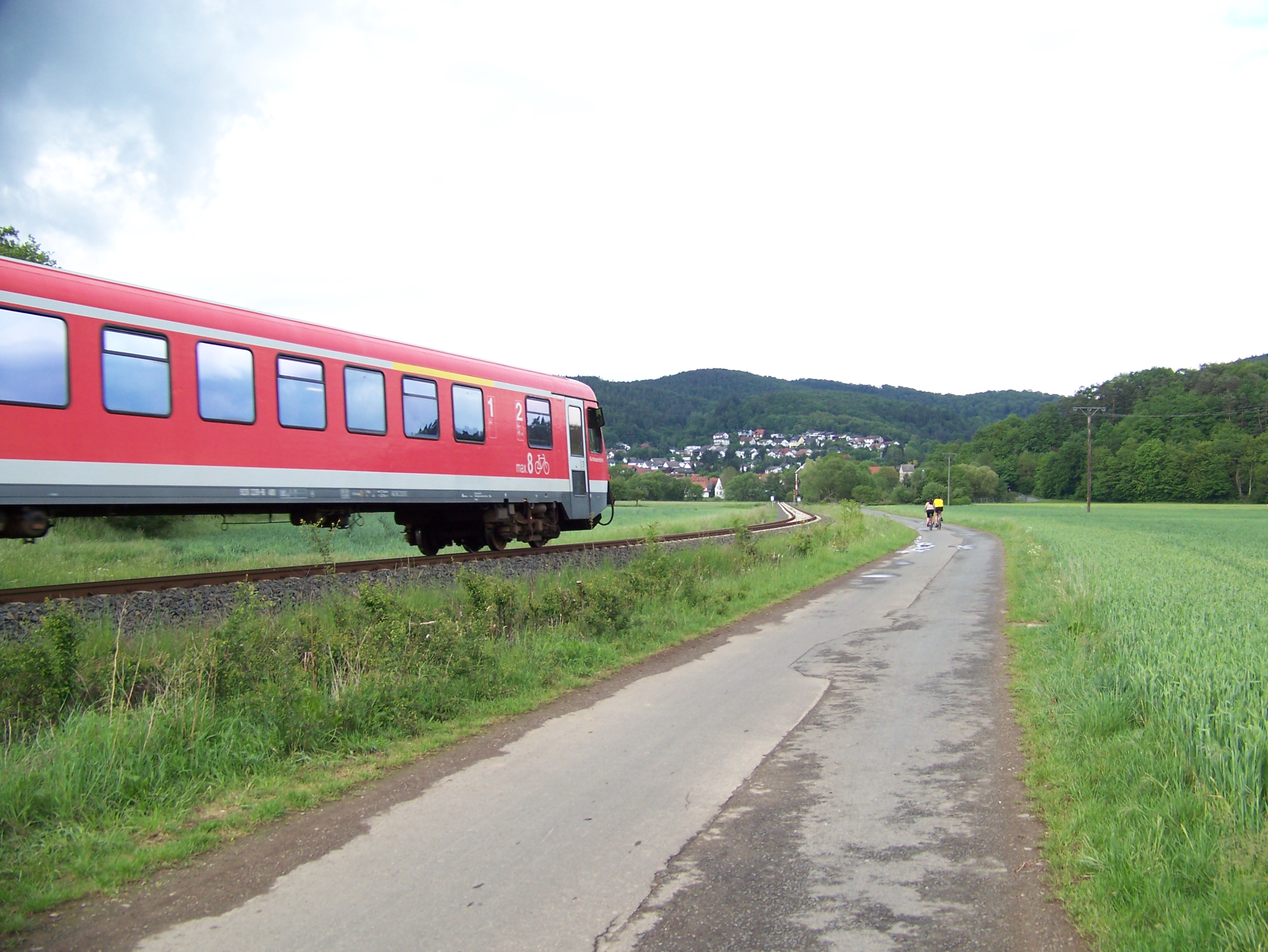 Zug (Baureihe 628) der Kurhessenbahn zwischen Carlshütte und Buchenau in Richtung Marburg. Nebenan der Lahntalradweg.